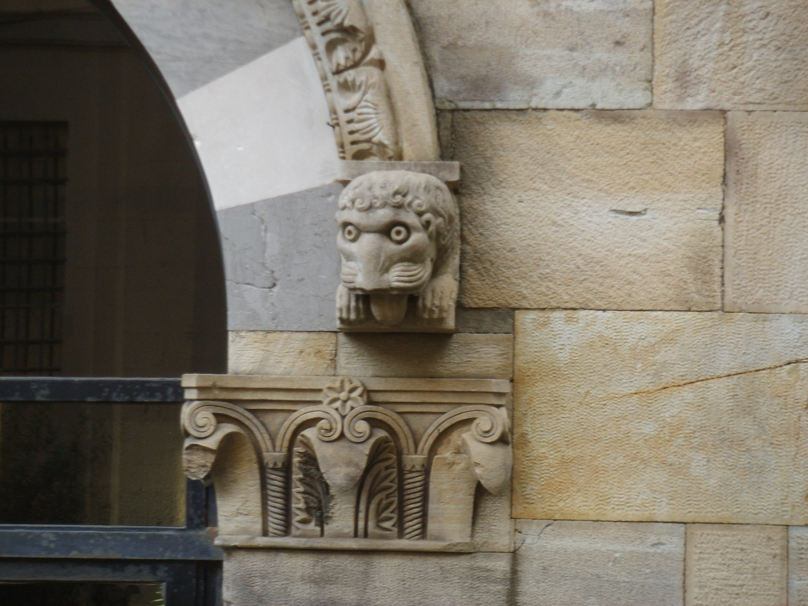 Santo sepolcro, pisa, portale 02.2